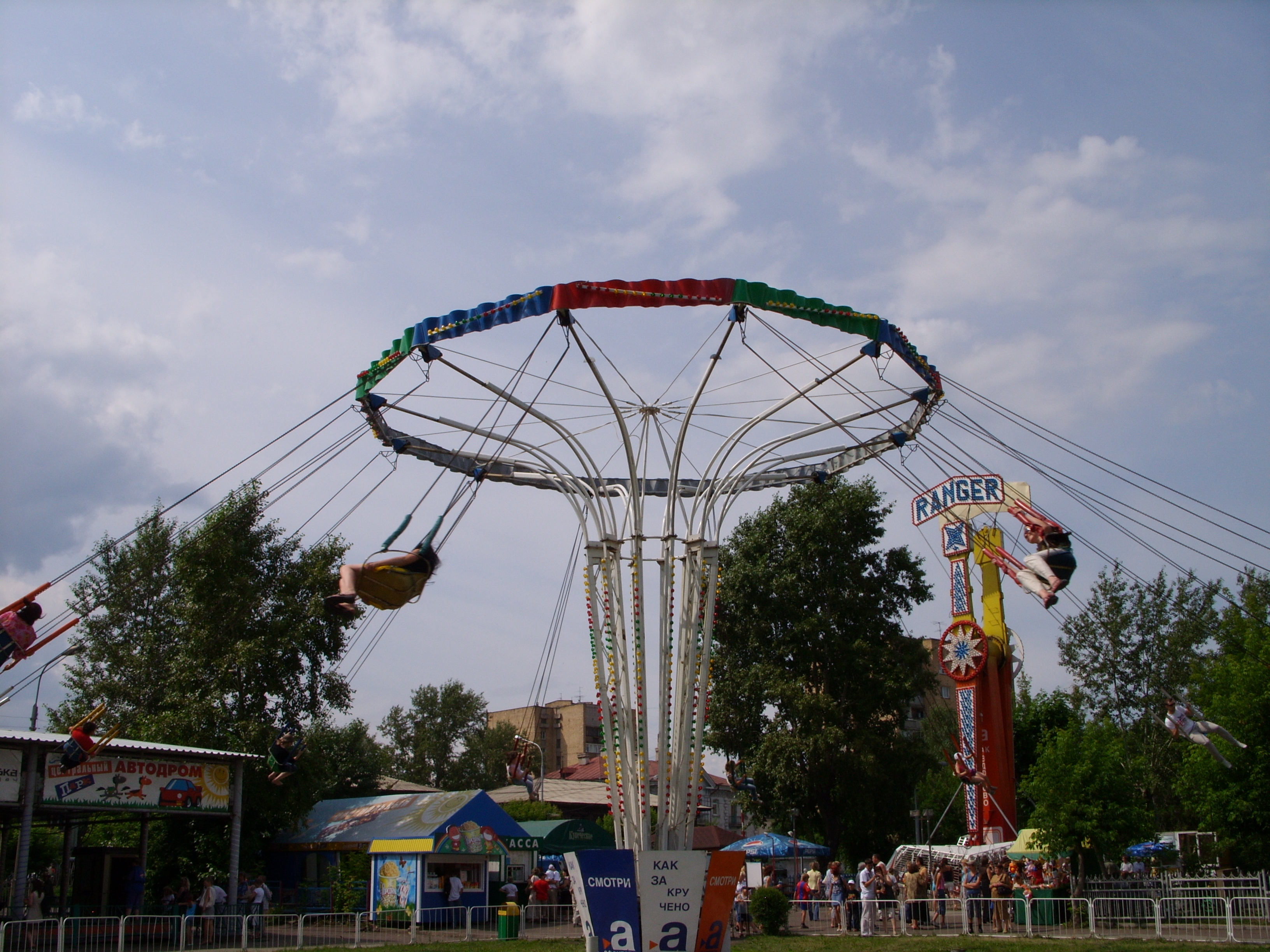 снимки июля 2008 г.